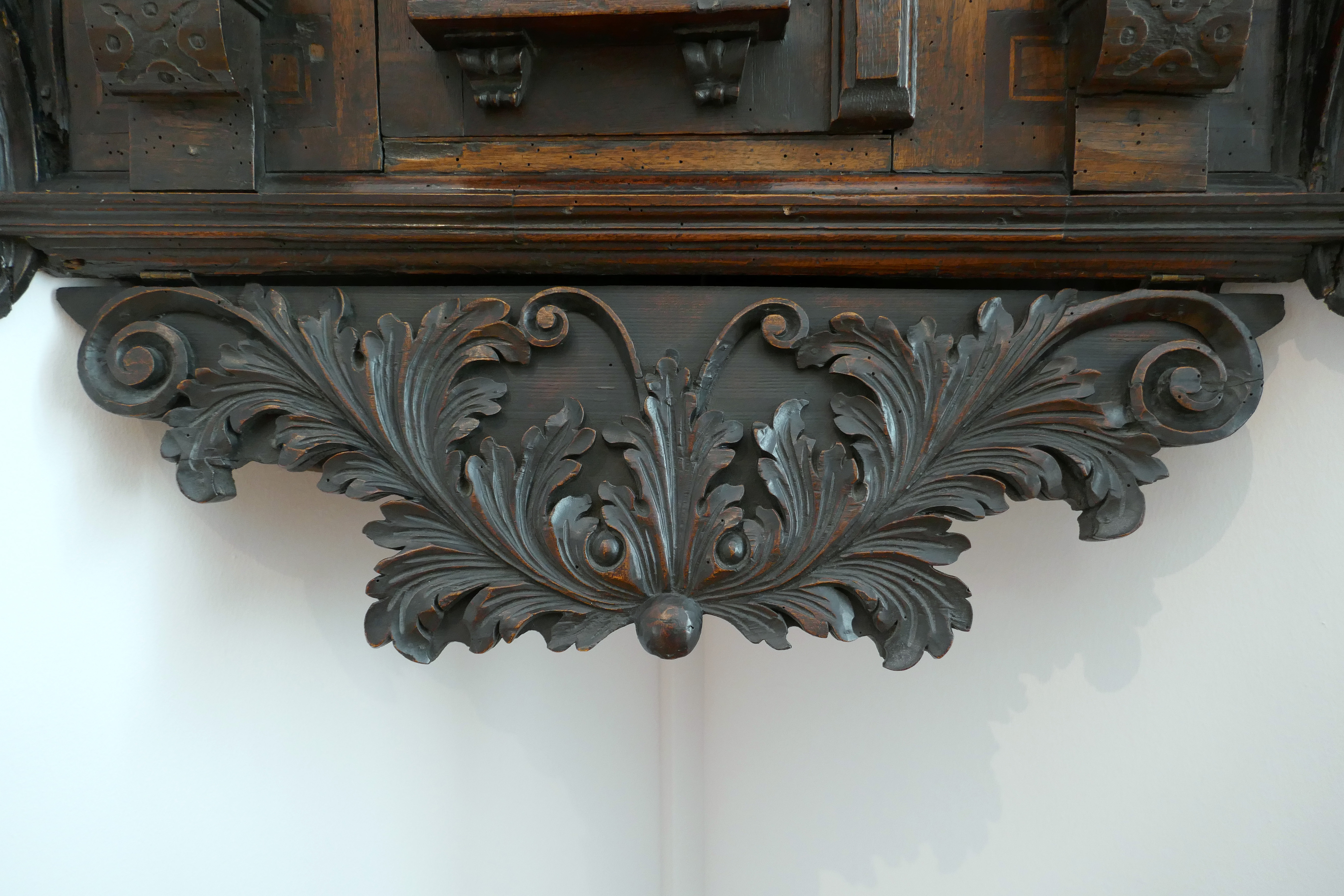 Encoignure marquetée avec jouées et base à décor d'acanthe Alsace, fin du XVIIe siècle Résineux, noyer, frêne, fruitiers Musée de l'Œuvre Notre-Dame de Strasbourg. N° 22.998.0.697